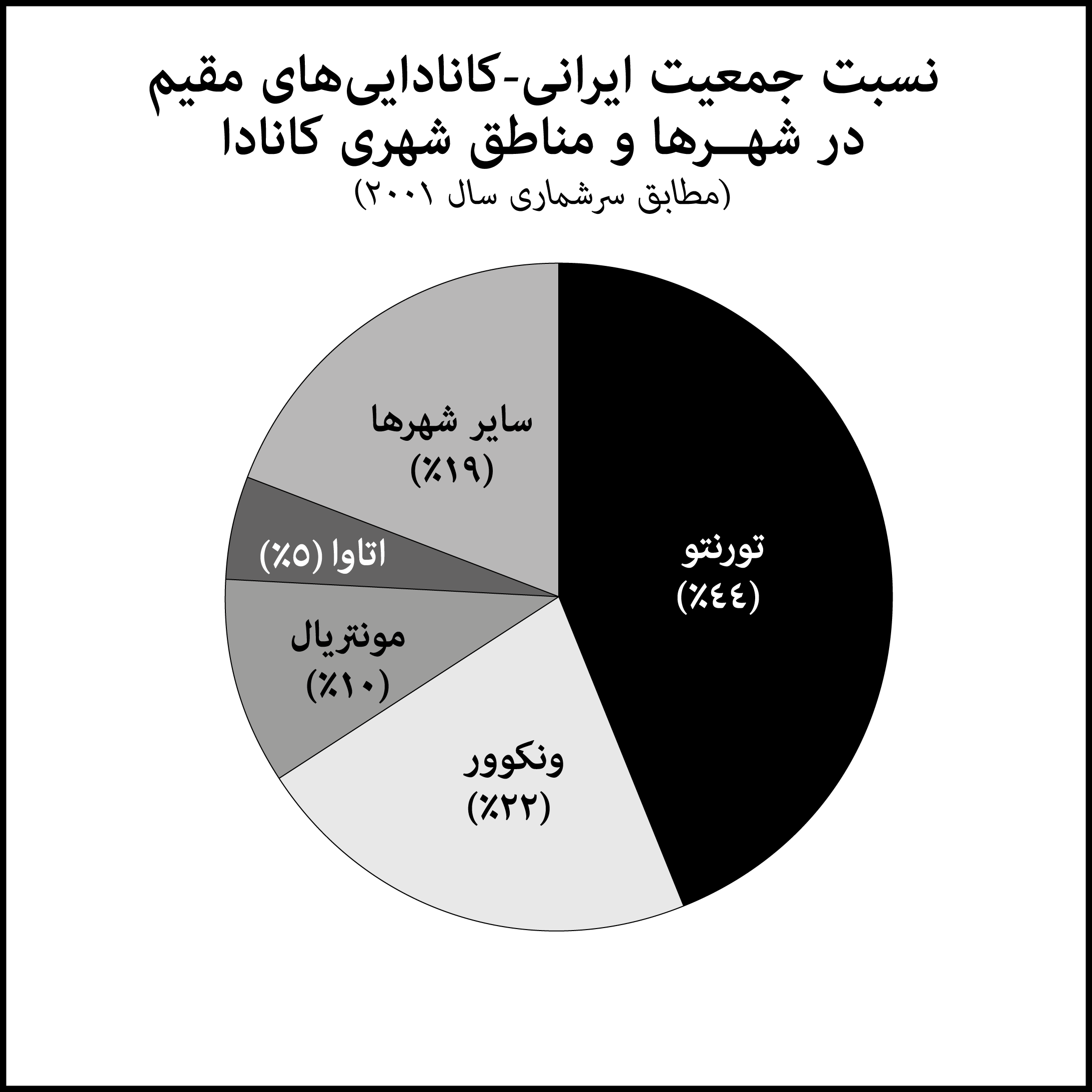 ۲۰۱۱جمعیت ایرانی-کانادایی‌ها در شهرهای کانادا